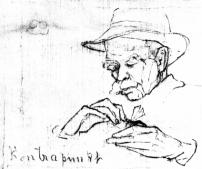 Jakob Johann von Uexküll